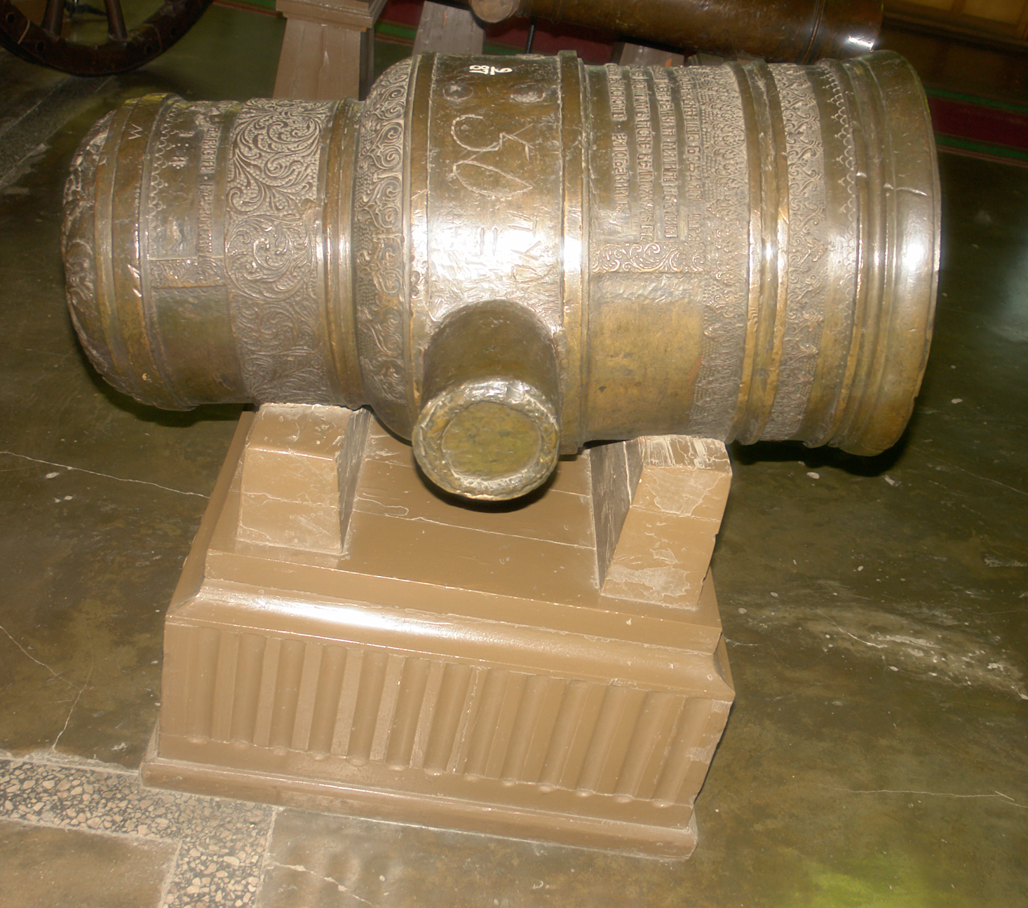 СТВОЛ 3-ПУДОВОЙ (330-мм) ПОЛЕВОЙ МОРТИРЫ Ствол бронзовый. Длина — 97 см. Масса — 865,7 кг. Отлит в 1698 г. в городе Глухове мастером Карпом Иосифовичем.